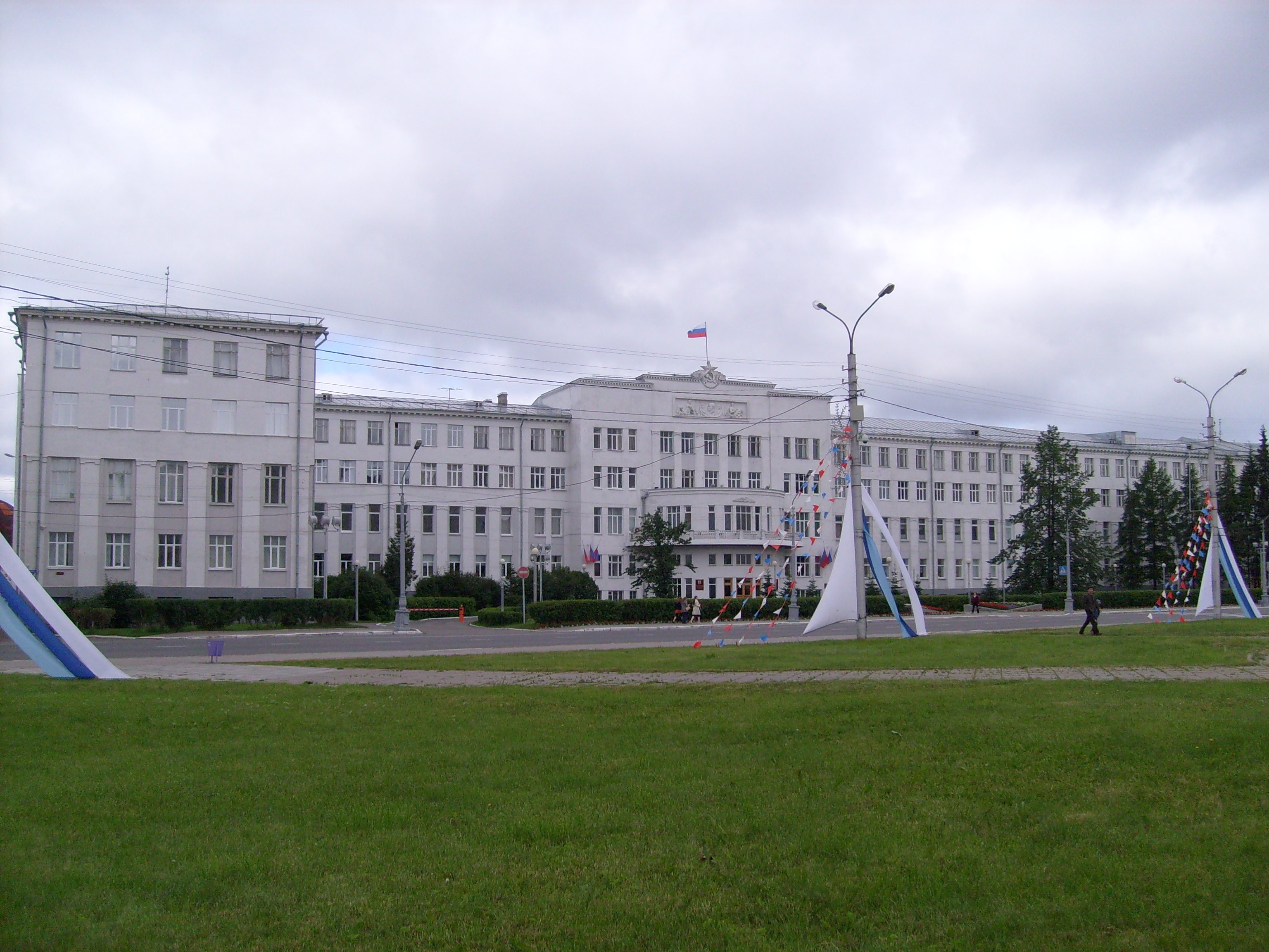 Здание Администрации Архангельской области, Троицкий проспект, Архангельск